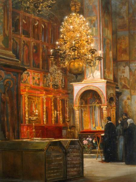 Akafist Svytomu Tsarevichu Dmitriyu